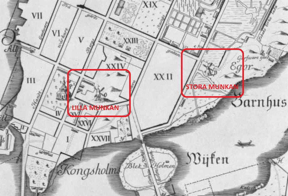 Kvarnar Lilla och Stora Munken på Kungsholmen